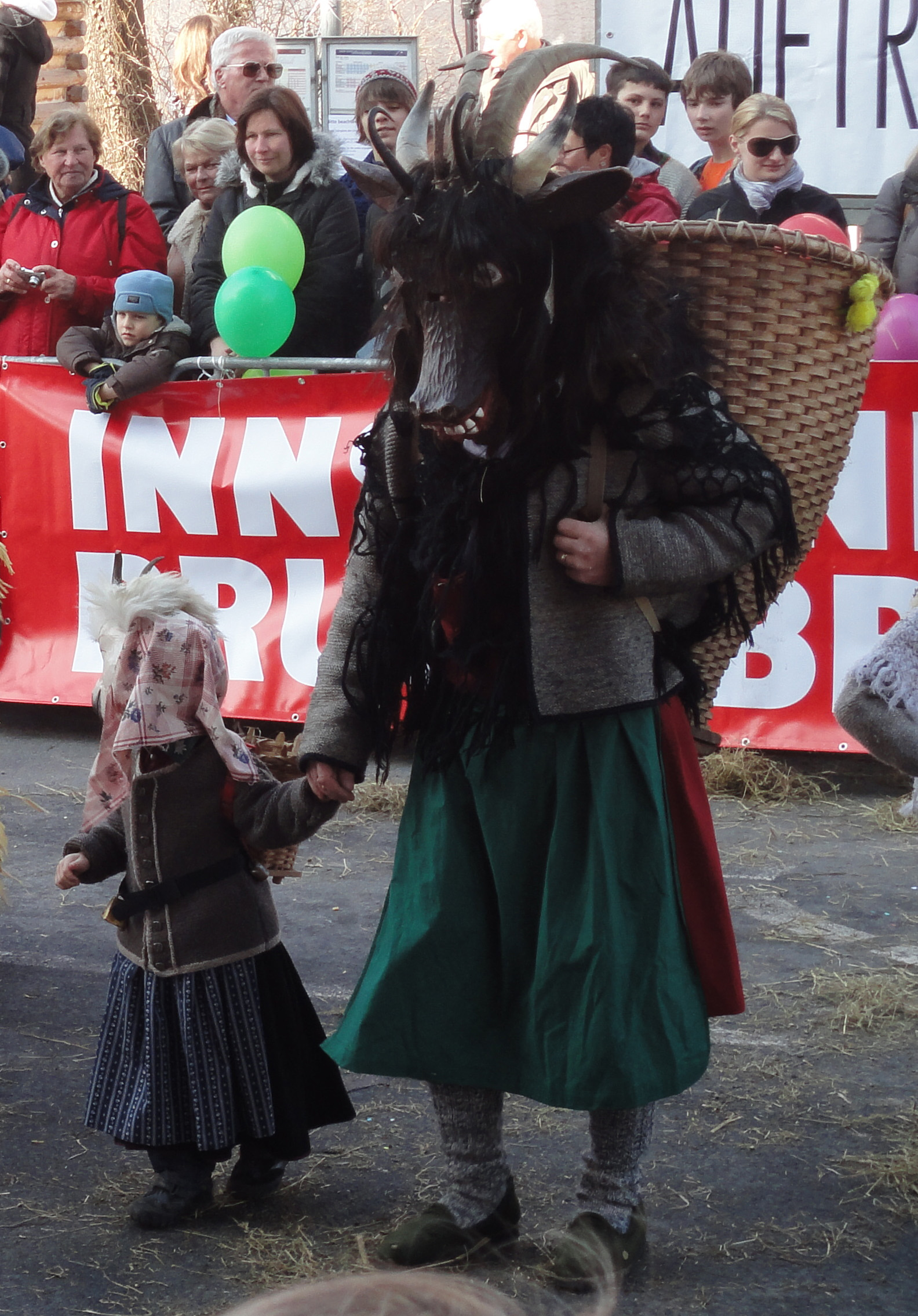 Die Habergeiß ist ein Korndämon. Das Bild zeigt die Habergeiß bei einem Faschingsumzug in Innsbruck.